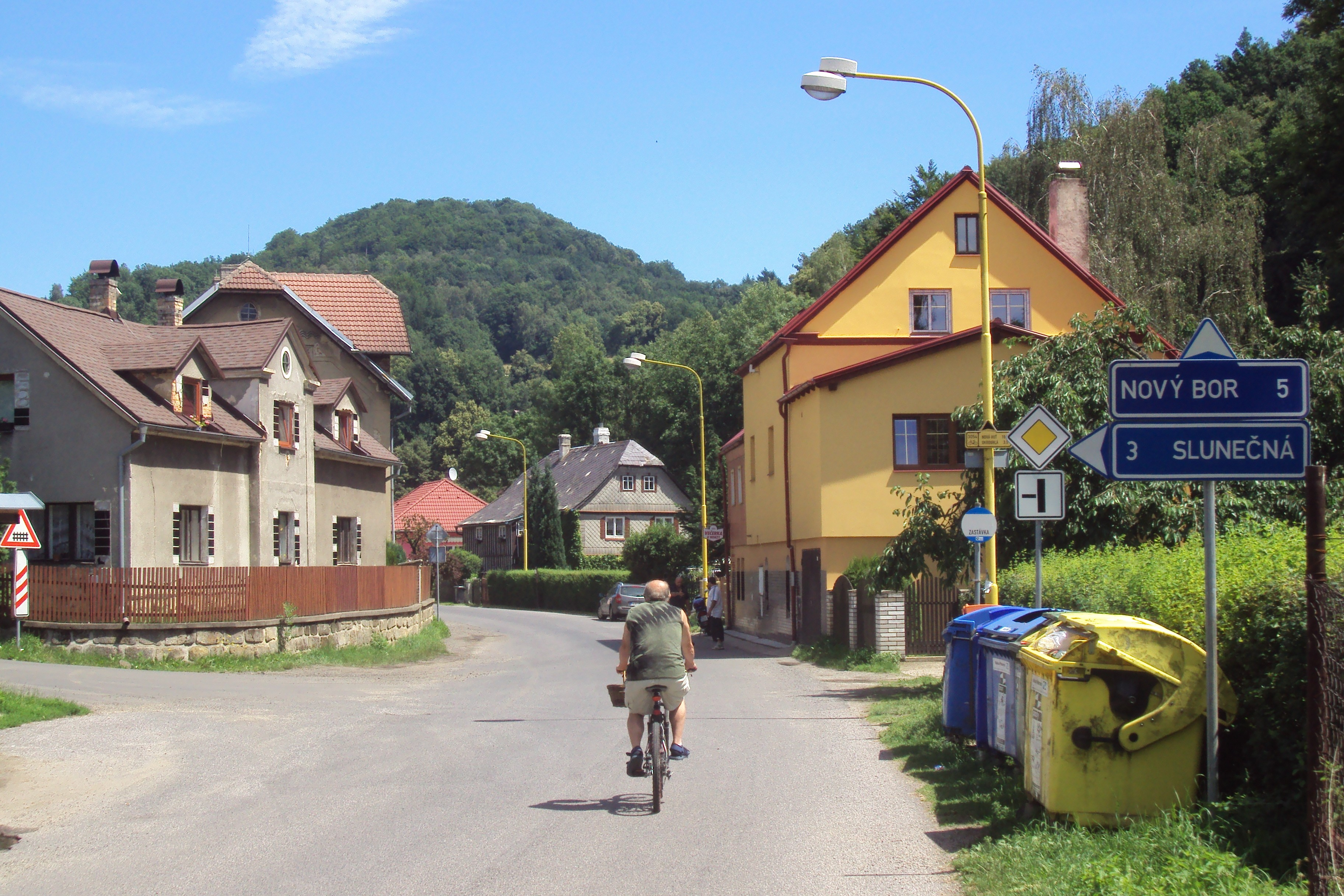 Křižovatka v obci Skalice